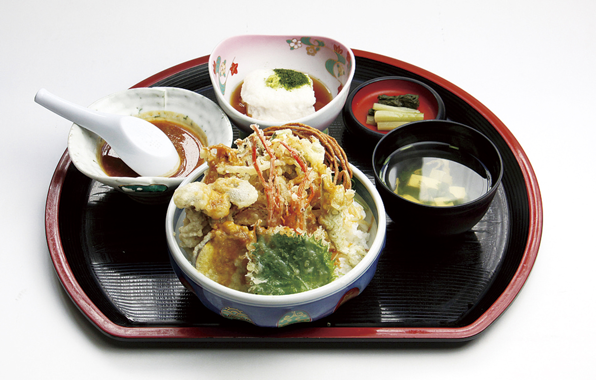 信州諏訪みそ天丼提供イメージ。提供店舗や季節により内容は異なります。